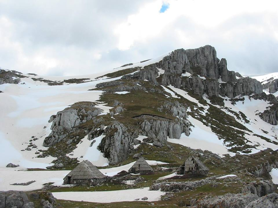 Pamja Ne Maje Te Pashtrikut